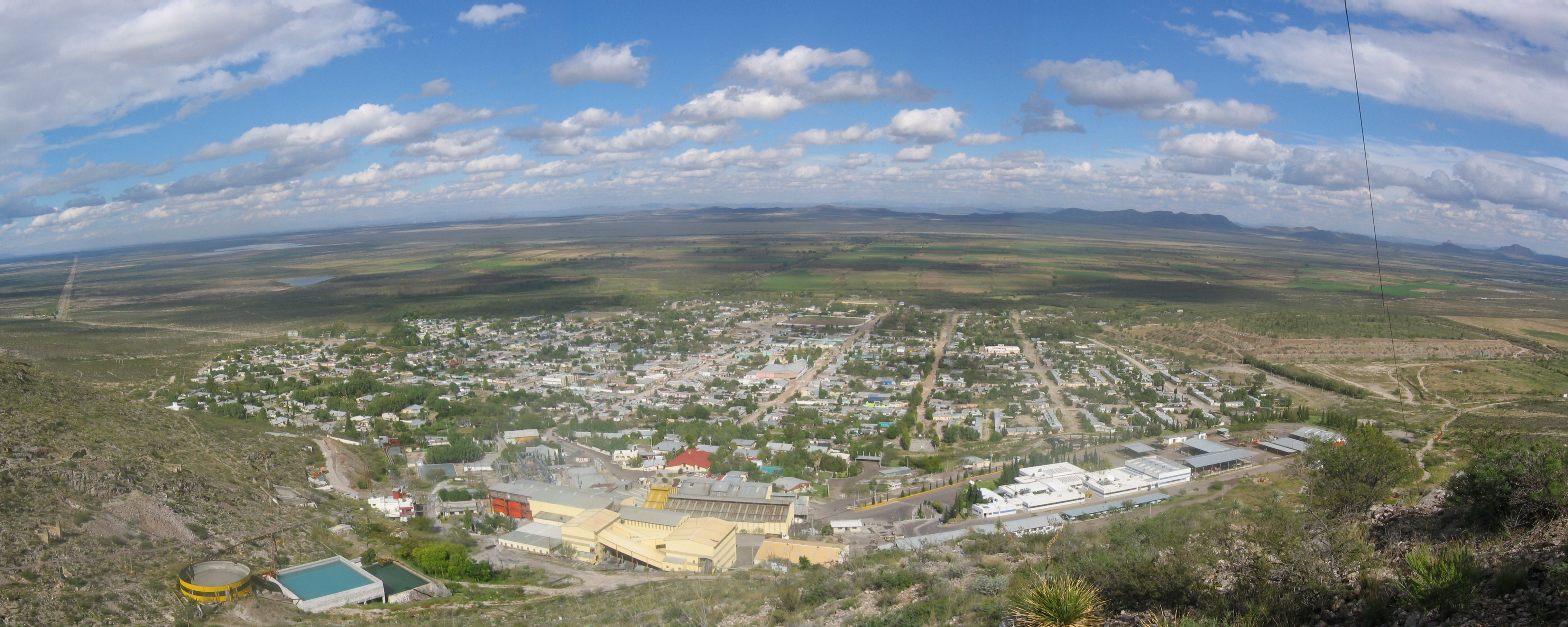 PUEBLO DE NAICA